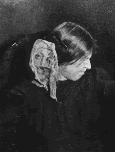 Bilden är tagen sv:8 maj sv:1912 av Baron von Schrenck-Notzing (sv:1862-sv:1929) och föreställer mediet Eva Carrière som frammanar ett ansikte av ektoplasma.